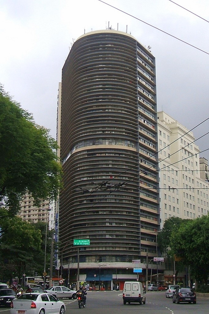 Edifício Montreal, projeto de Oscar Niemeyer (1950); Avenida Ipiranga, centro da cidade de São Paulo, Brasil.